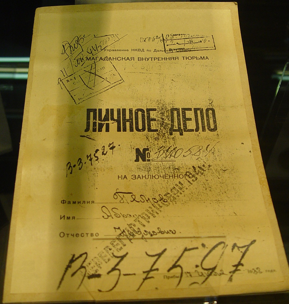 Обложка личного дела А. Н. Пемова - бывшего зам. директора "Дальстроя", 1938 г. Из экспозиции Магаданского областного краеведческого музея, 2010 г.